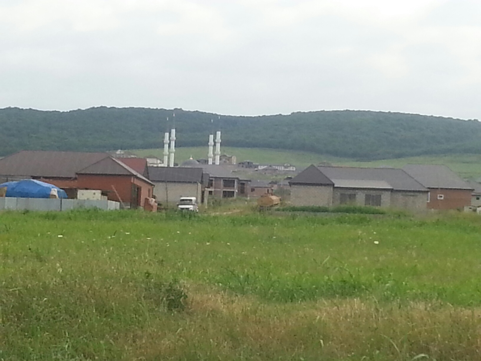 Новый Беной